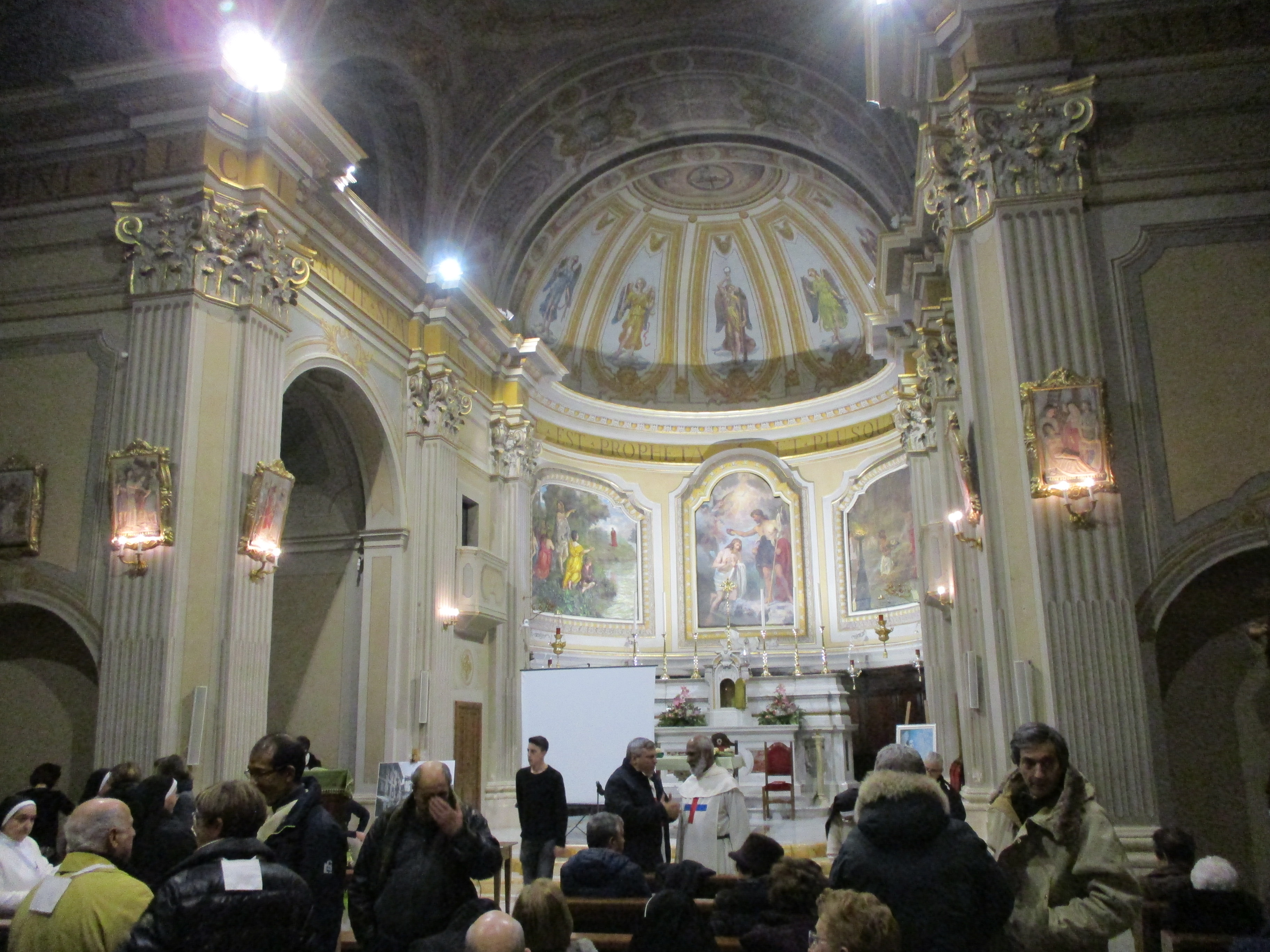 Interno della chiesa